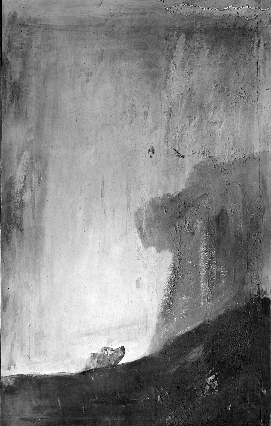 Fotografía realizada por J. Laurent en 1874 de la pintura Perro semihundido de Francisco de Goya, antes de su arranque del muro de la Quinta del Sordo, o Quinta de Goya. El negativo original se conserva en el Archivo Ruiz Vernacci, en Madrid.